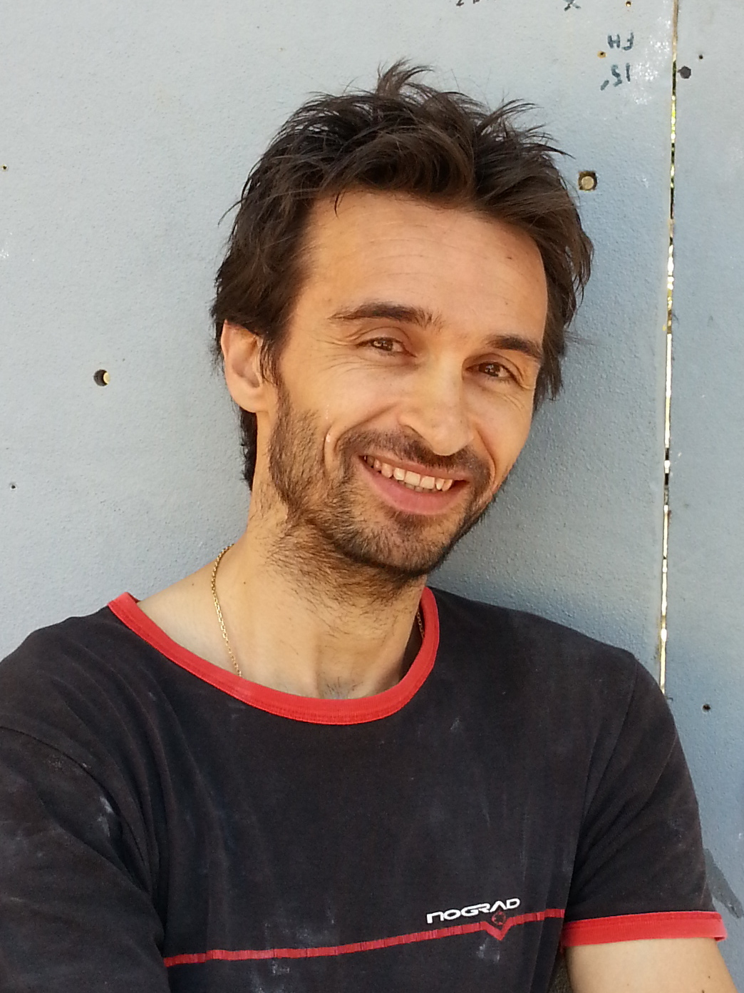 François Legrand en juillet 2012 à Briançon